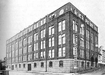 Arvi A. Kariston toimitalo, nykyisin Hämeenlinnan oikeustalo